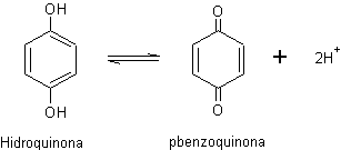 polimerização radicalar